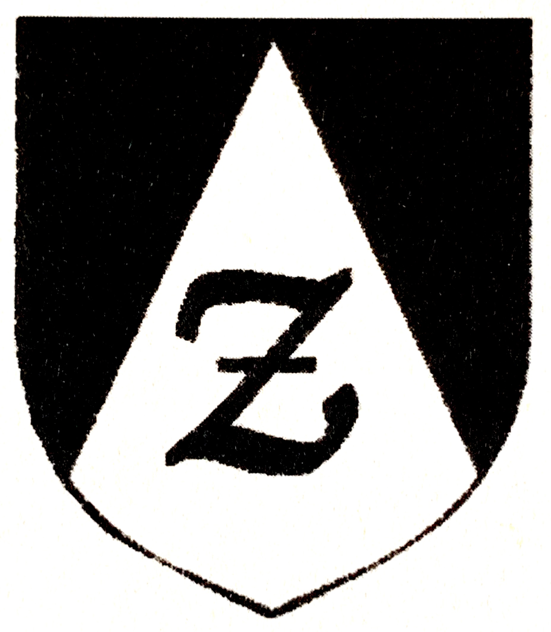 Znak Zdislávek - sekulární institut Dílo blažené Zdislavy